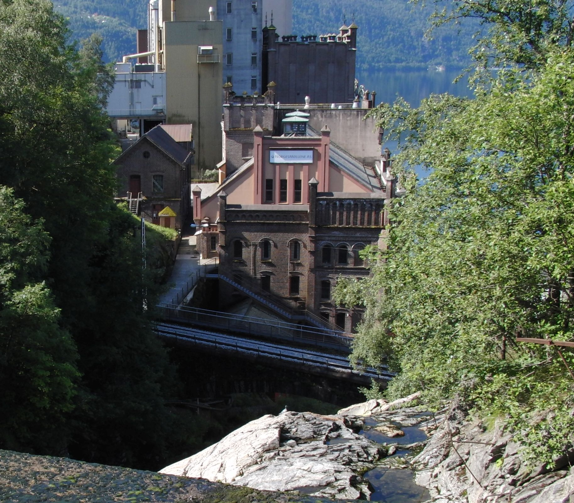 Vaksdal Mølle. Kraftstasjon nede til høyre, ikke synlig